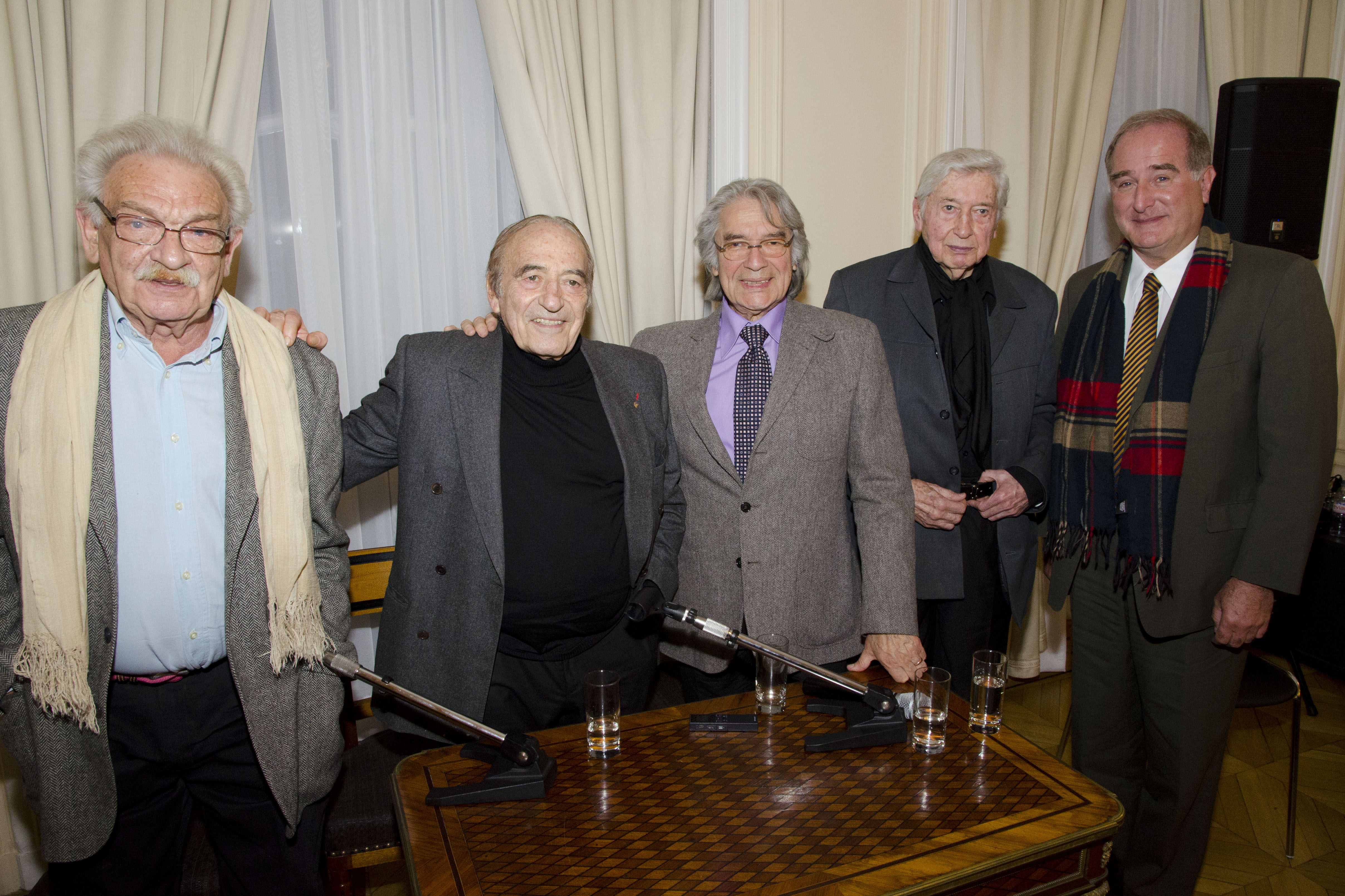 Painter Antonio Seguí, pianist Miguel Angel Estrella, folk musician Raúl Barboza, sculptor Julio Le Parc, and National Director for the Arts José Luis Castiñeira de Dios together at the 2014 Paris Book Fair. Photo: Augusto Starita / Secretaría de Cultura de la Presidencia de la Nación